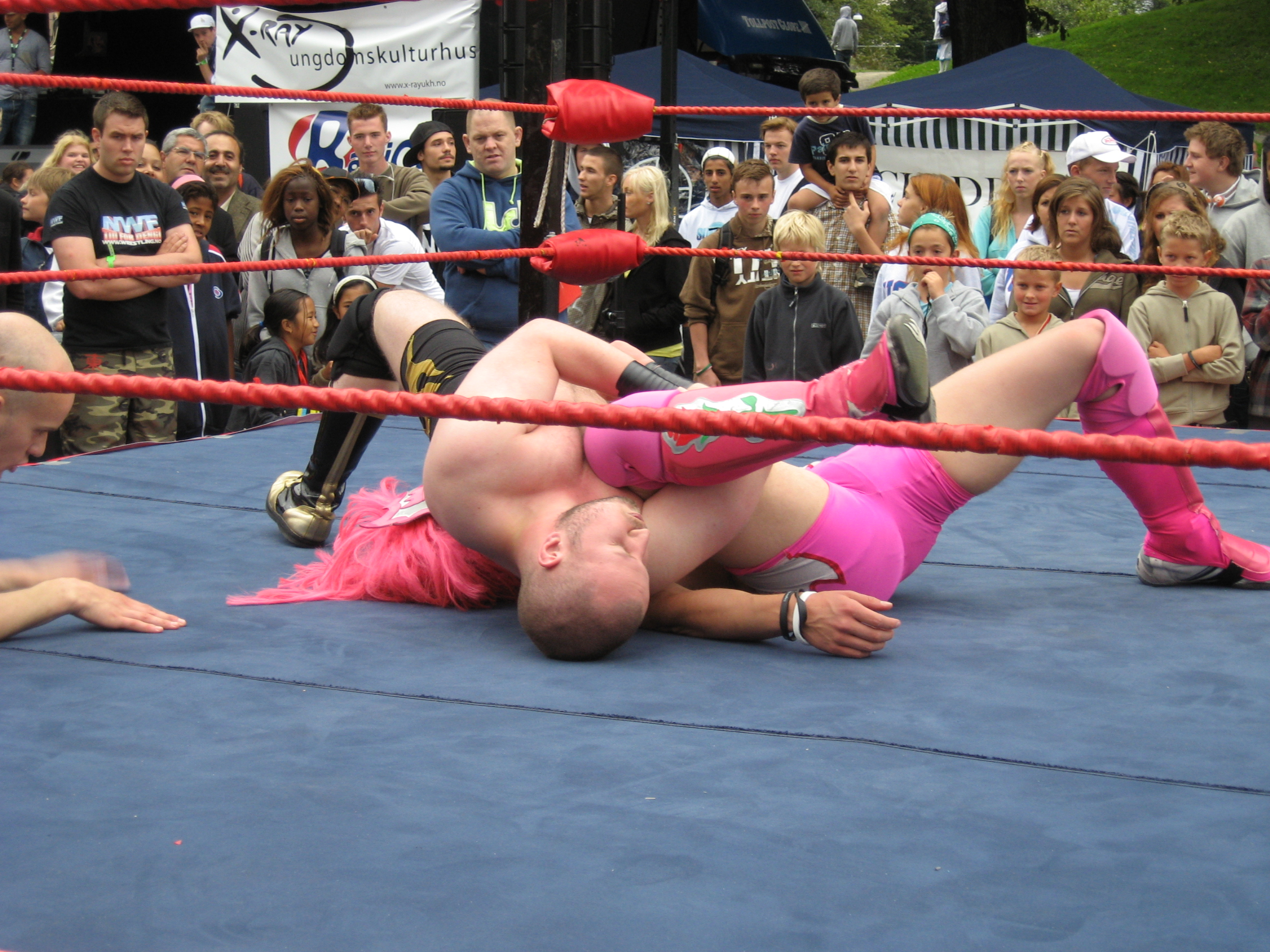 Big John vinner en pinfall mot Sensuelle Rosé, på Summer Splash på Aker Brygge.Big John defeats Sensuelle Rosé